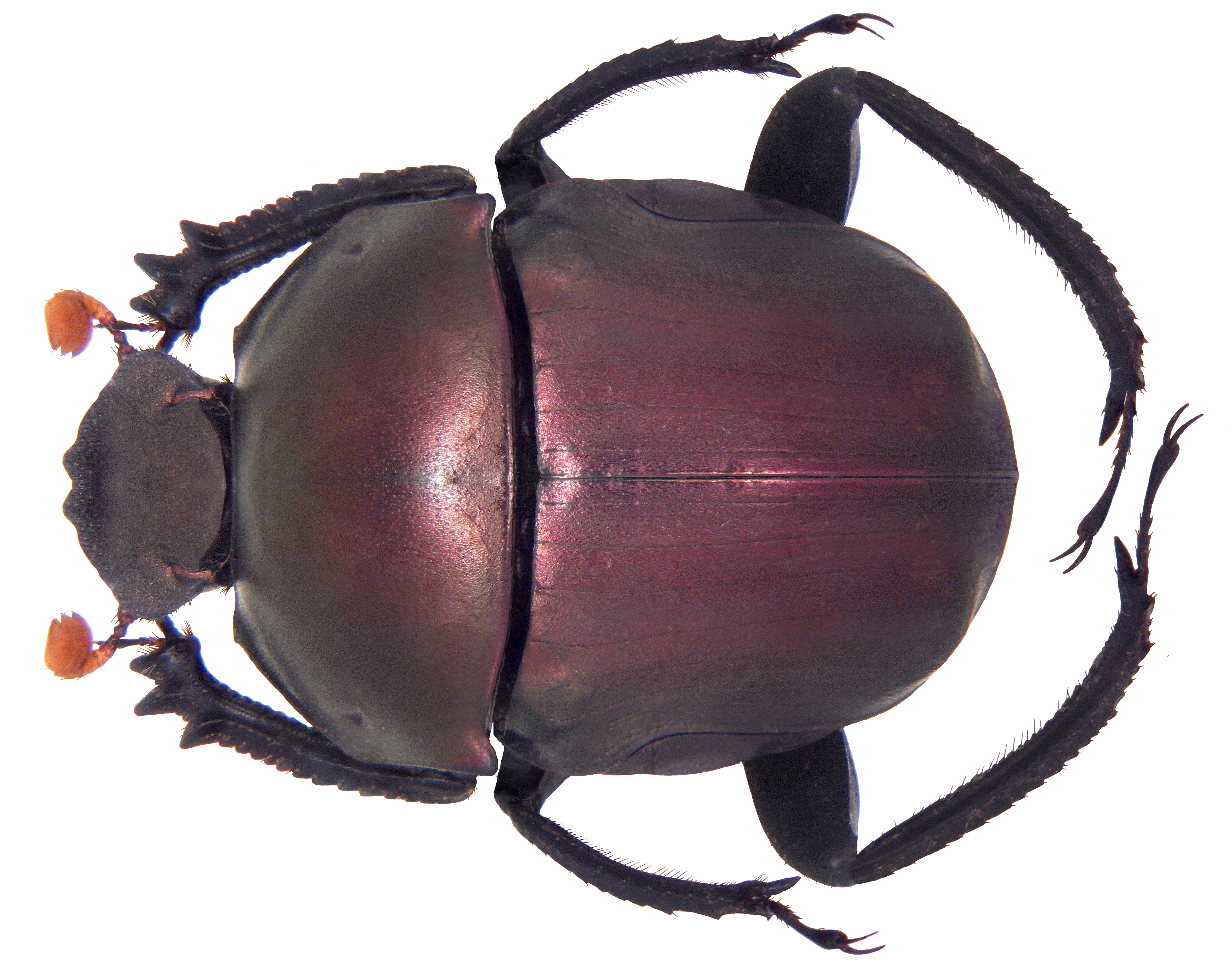 Familie: Scarabaeidae Groesse: 19 mm Fundort: Thailand, Mae Hong Son, Ban Huaipo leg. Pachlatko, 1991; det. J. Scheuern, 1993 Photo: U.Schmidt, 2010